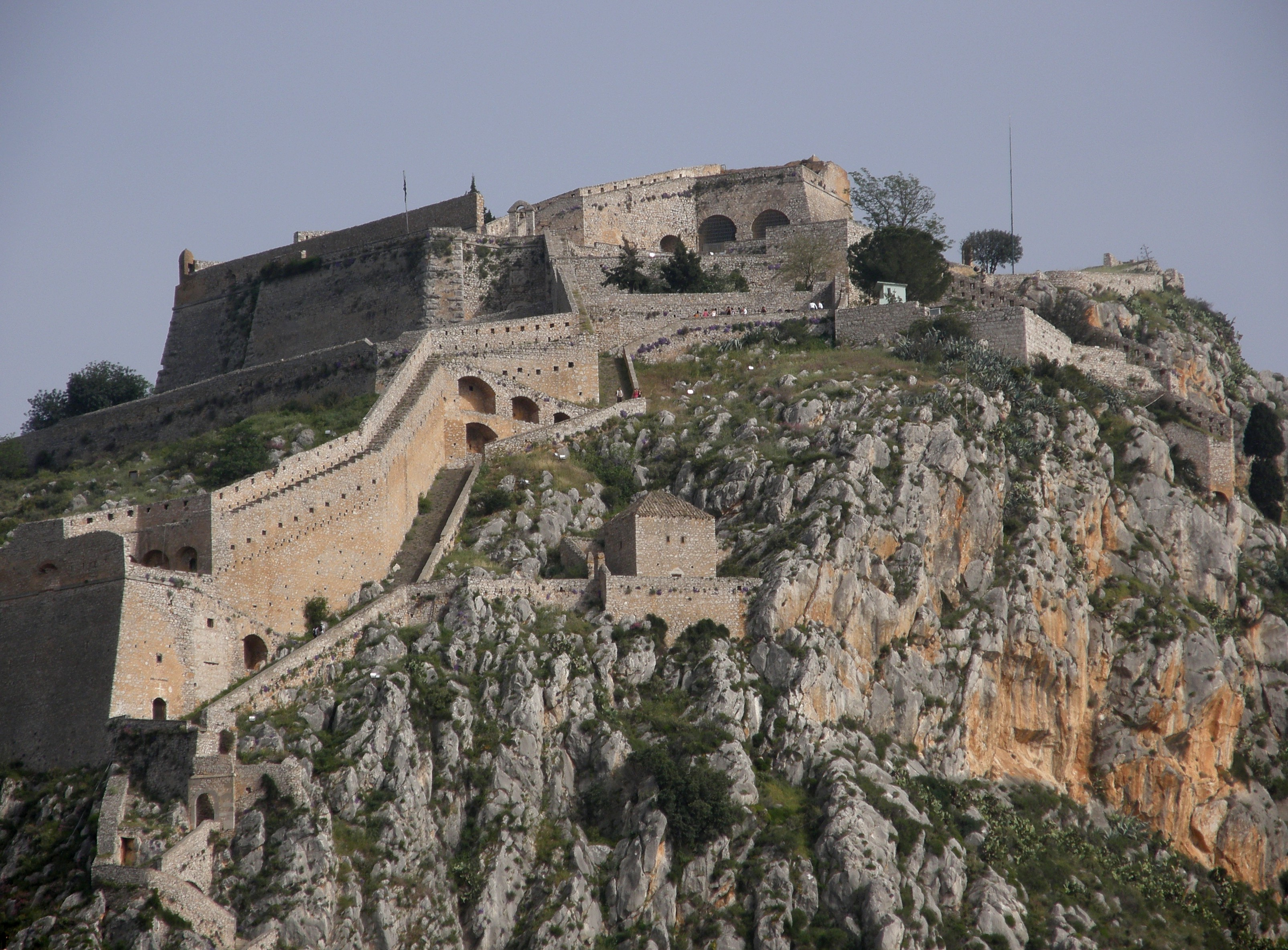 Festung Palamidi über Nauplia